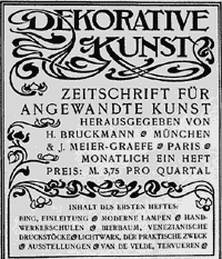 Dekorative Kunst aagazine masthead 1903